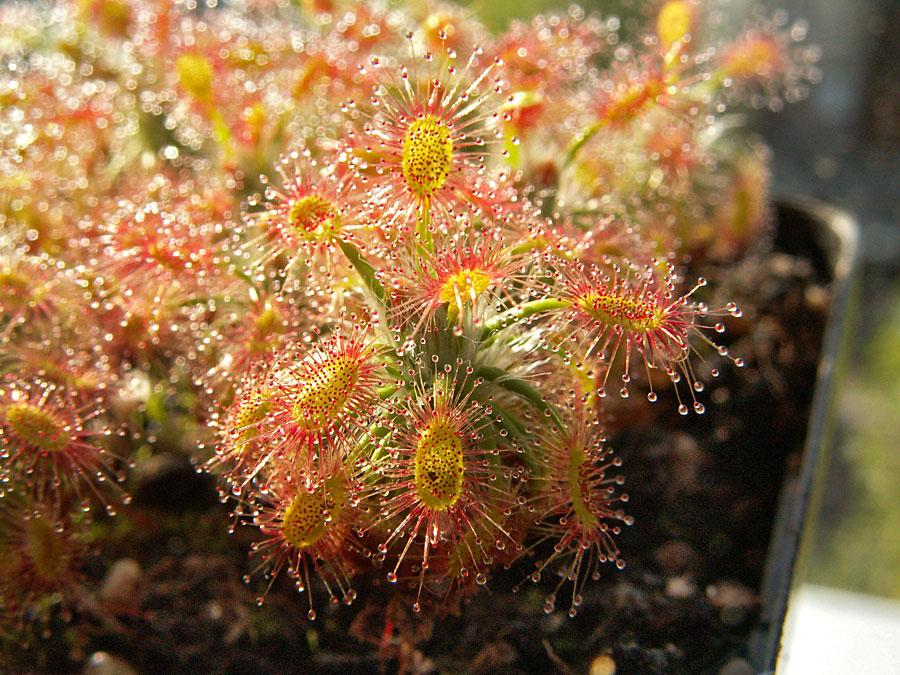 Drosera dichrosepala in cultivation